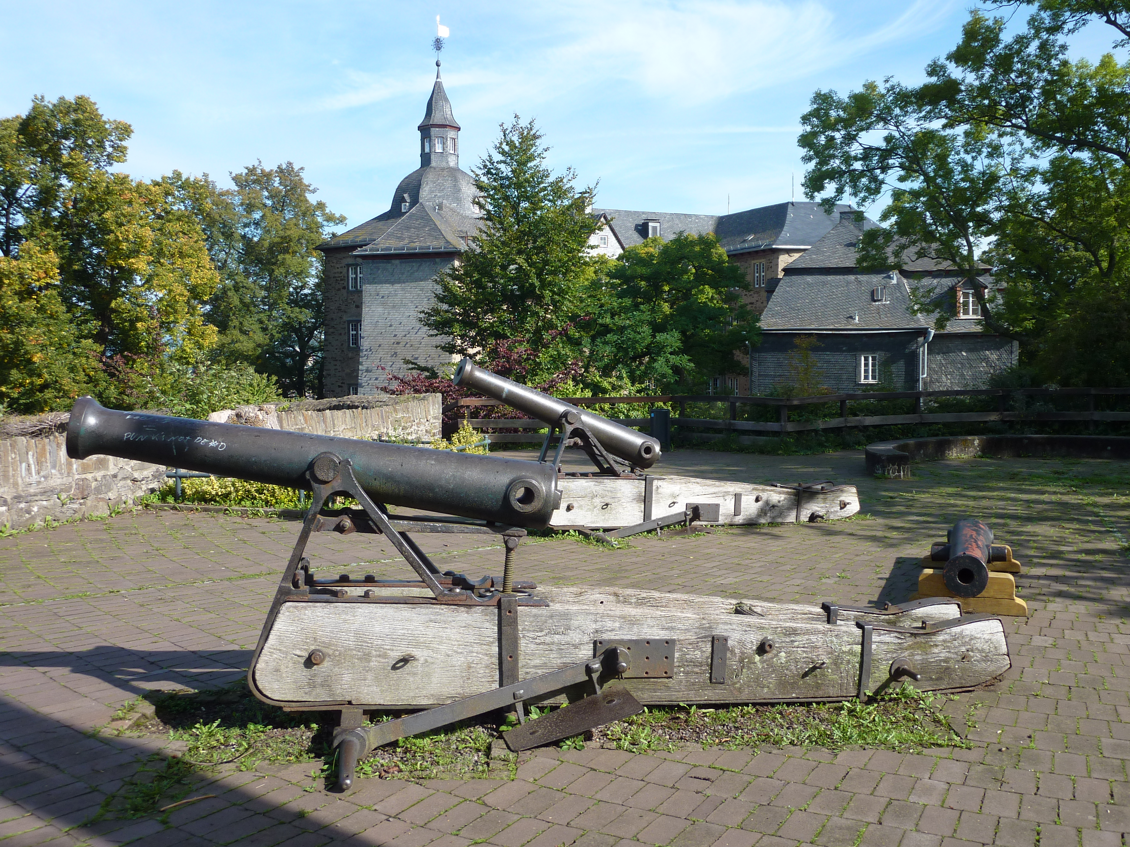 Oberes Schloss in Siegen/Westfalen: Geschütze (lange Kartaunen – „Viertelbüchsen“ – auf Resten von Wandlaffetten, ohne Räder) auf der Hasengarten-Bastion. Die Geschütze wurden auf der Hasengarten-Bastion des katholischen Oberen Schlosses im Laufe eines langjährigen innerstädtischen Konfessionsstreits auf die Residenz der protestantischen Linie des Hauses Nassau, das Untere Schloss ausgerichtet. Im Hintergrund die Gebäude der Kernburg des Oberen Schlosses. Ansicht von Süden.